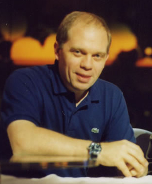 Foto di Marco Marzocca